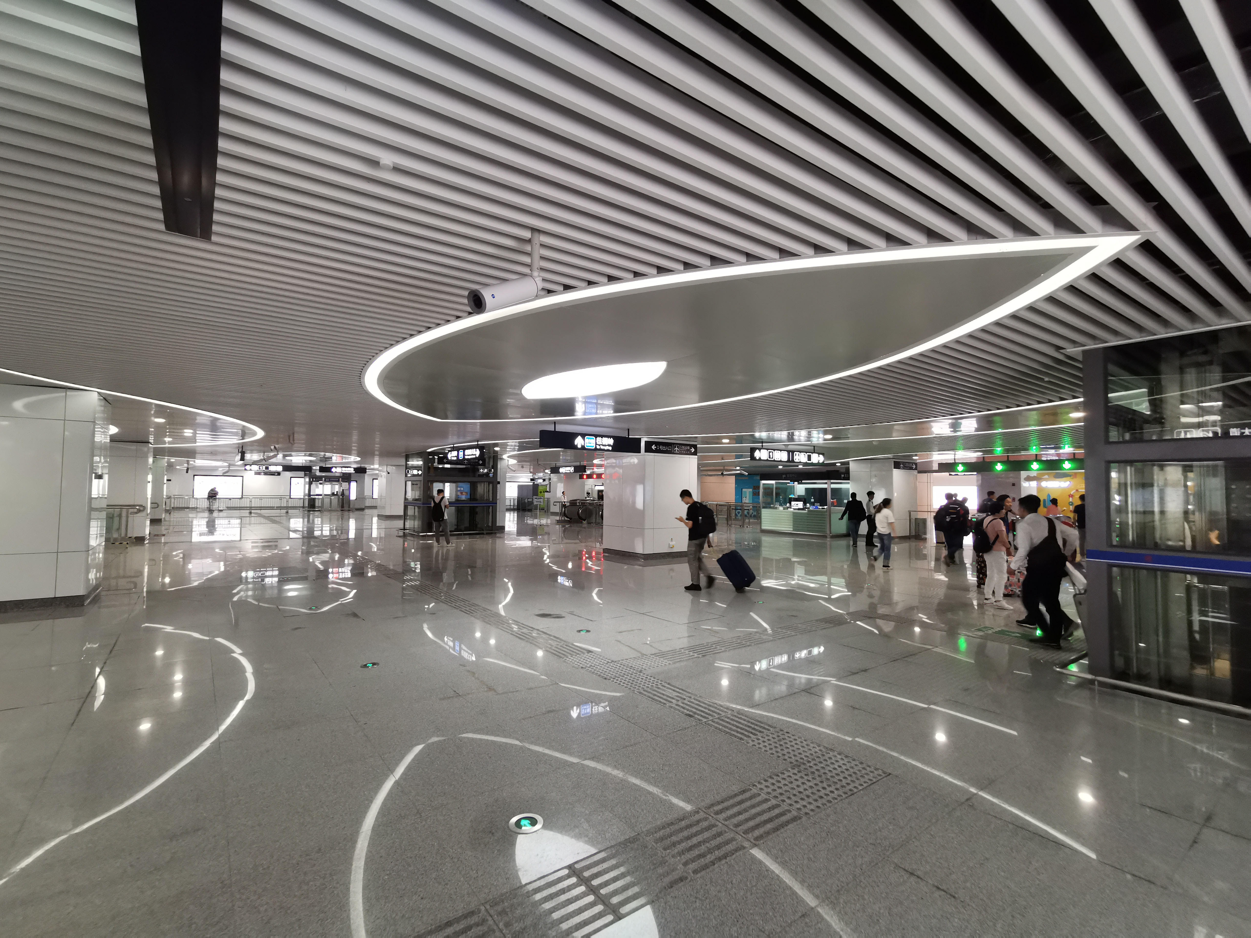 中文（中国大陆）: 温州轨道交通S1线，机场车站